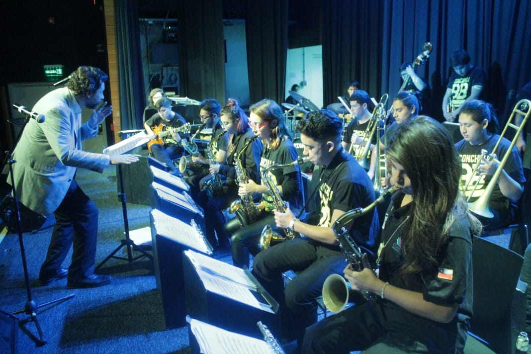 Banda tocando